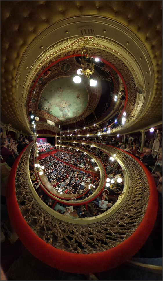 Concierto en Teatro Romea de la Ciudad de Murcia, con Carmina Burana - Visión general en final Omnioramaː Pulse para vista omniorámica